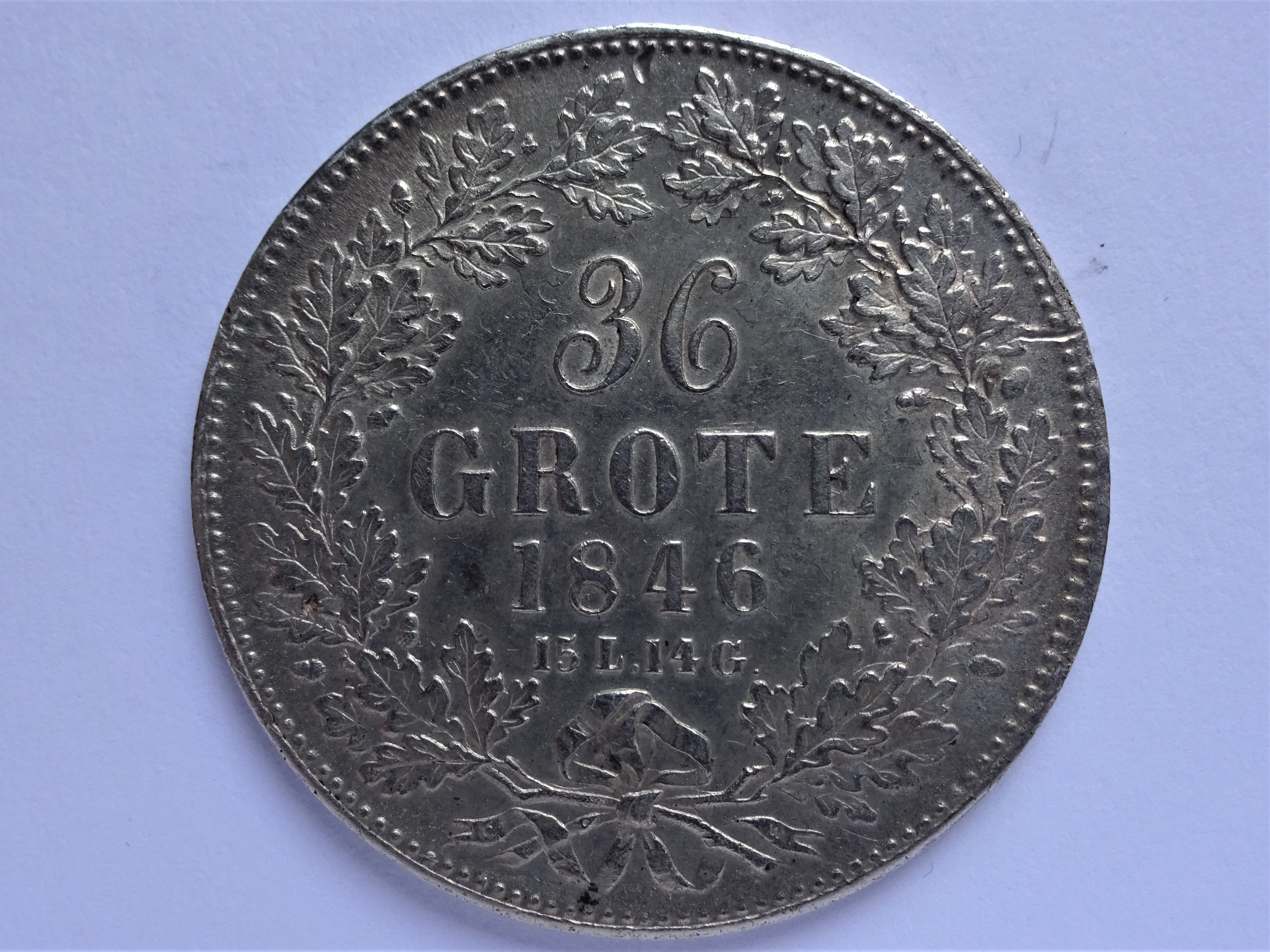 Bremer 36 Grotemünze von 1846, AKS 1, Wertseite